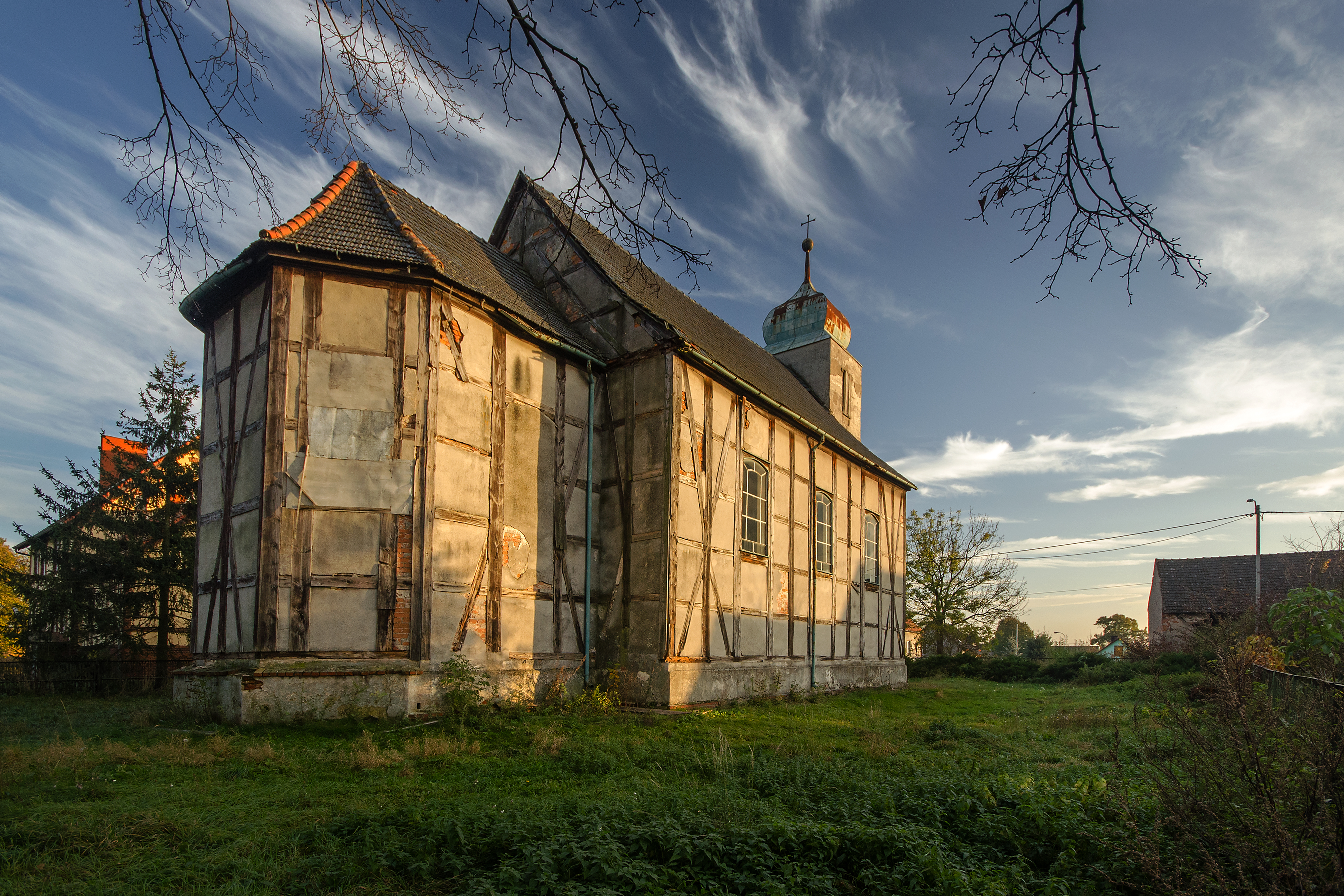 Minkowice Oławskie, kościół par. p.w. św. Jana Nepomucena, 1716, 1937